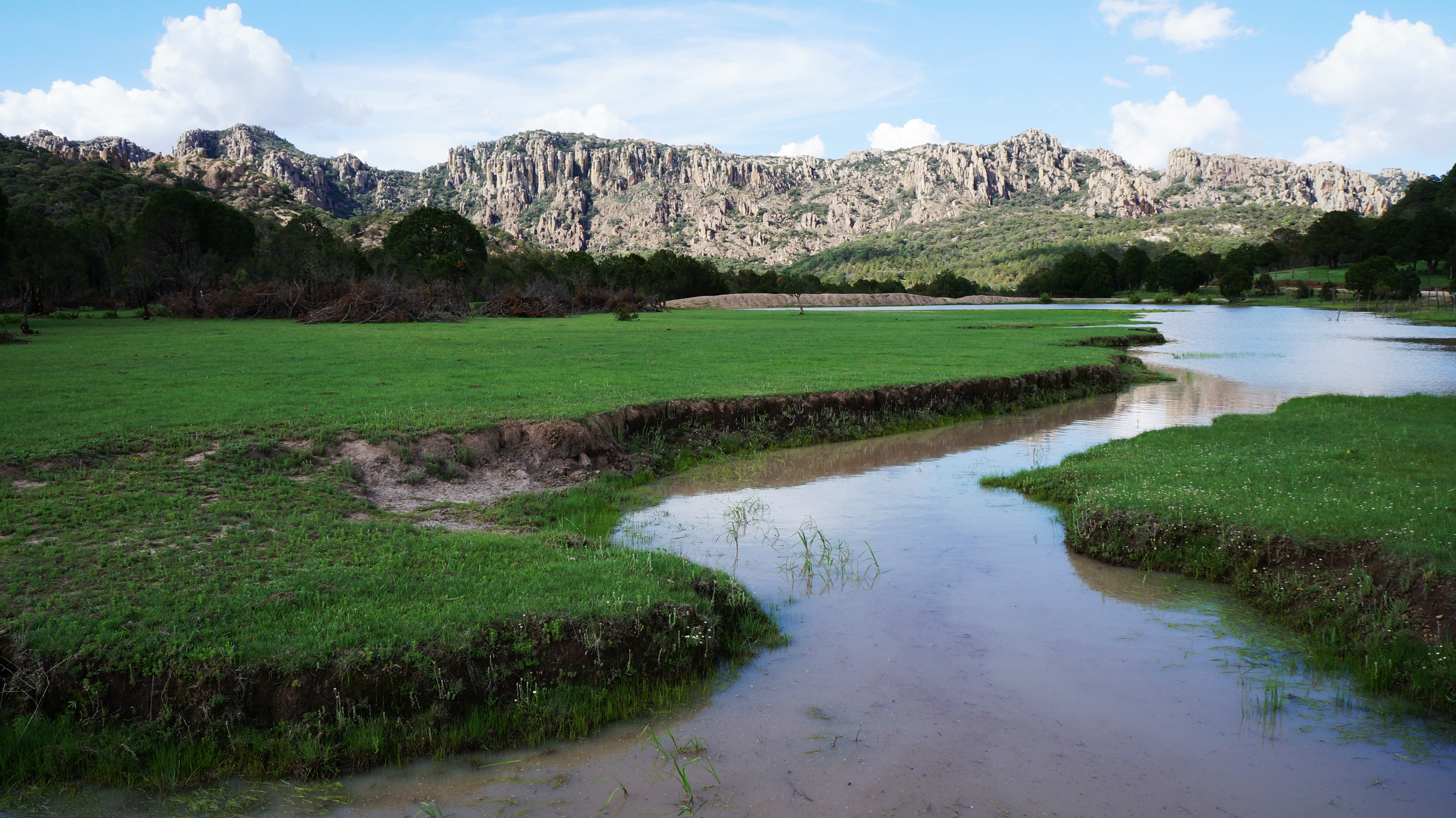 Con la lluvia se dibuja un nuevo paisaje en Sierra de Cardos.